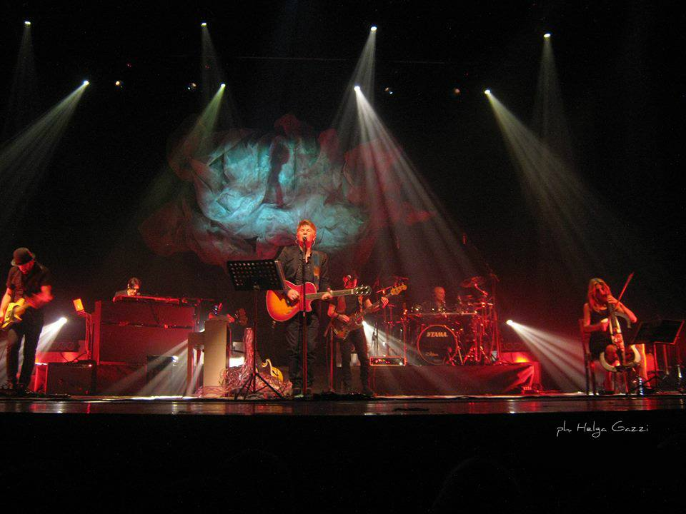 Ron in concerto. Milano, 2015.